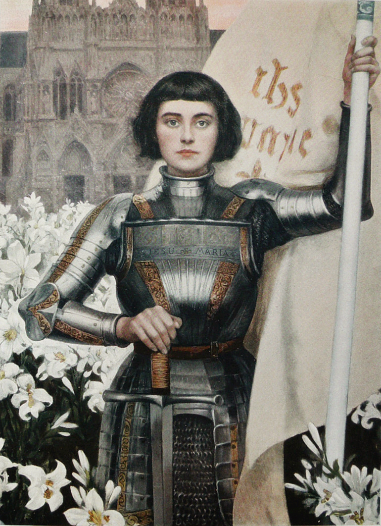 engraving from Figaro Illustre magazine, 1903